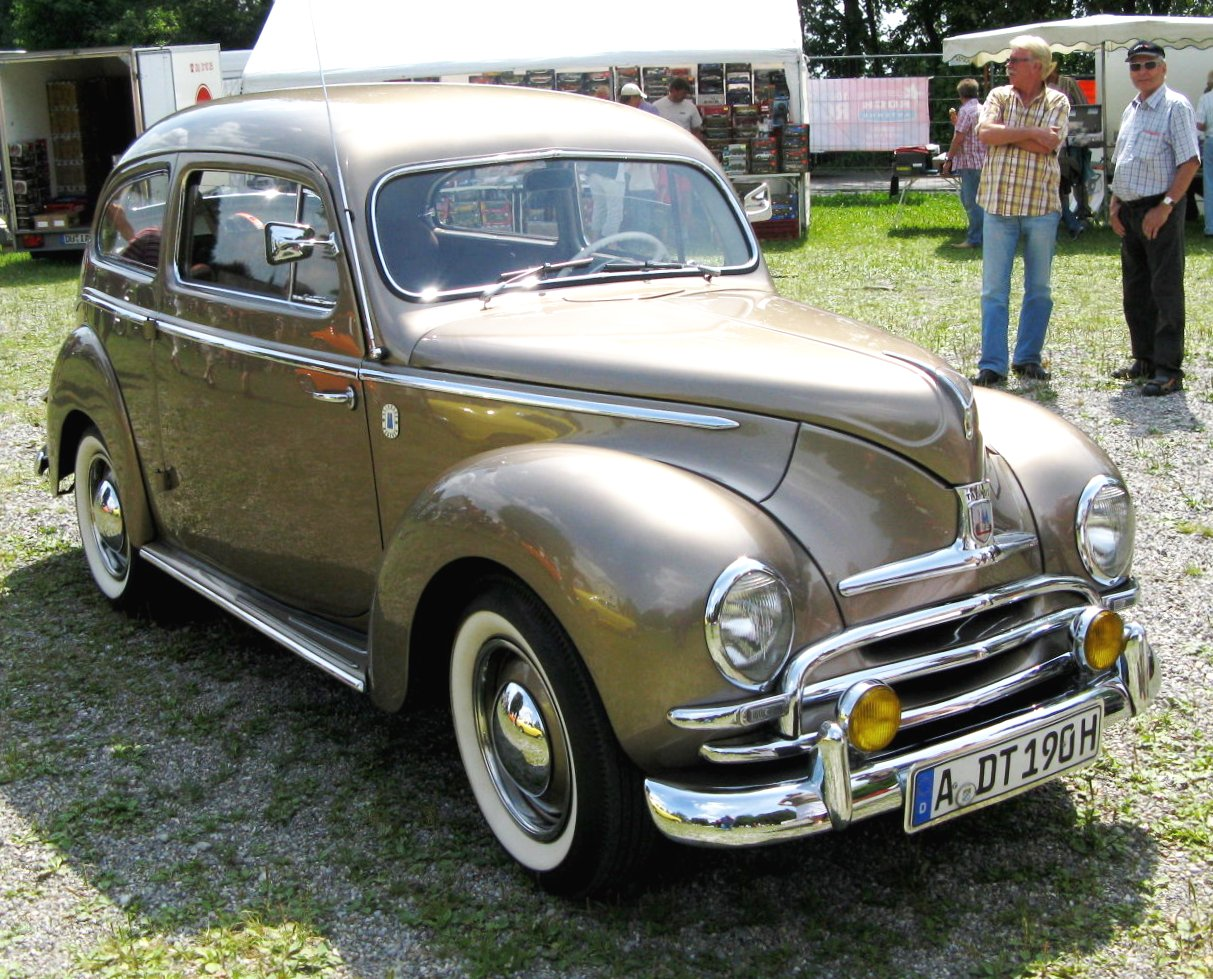 Ford Taunus G93A 1951 with Augsbourg license plate